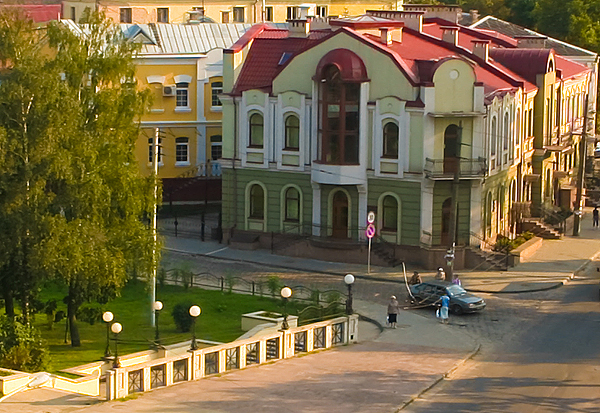 Old building. Danyla Bratkovskogo street